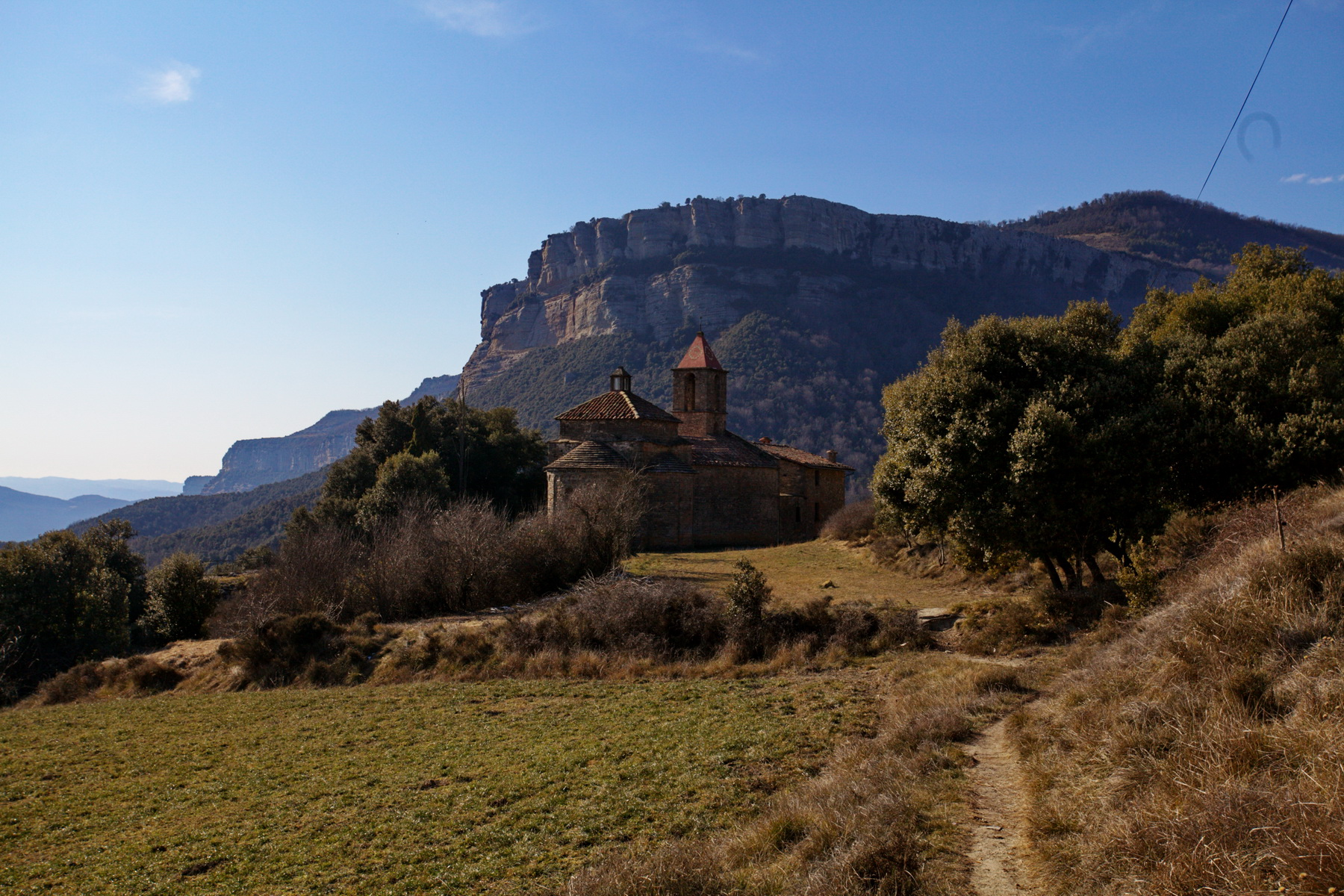 Església de Sant Joan de Fàbregues (Rupit i Pruit)